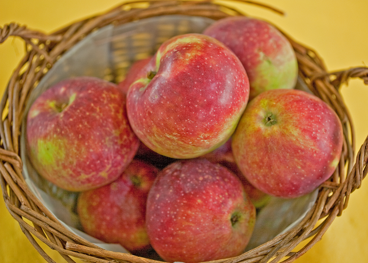 Der Blaue Kölner ist eine Apfelsorte